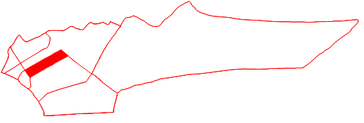 Ubicación de la parroquia Rómulo Betancourt en el municipio Cabimas, estado Zulia, Venezuela